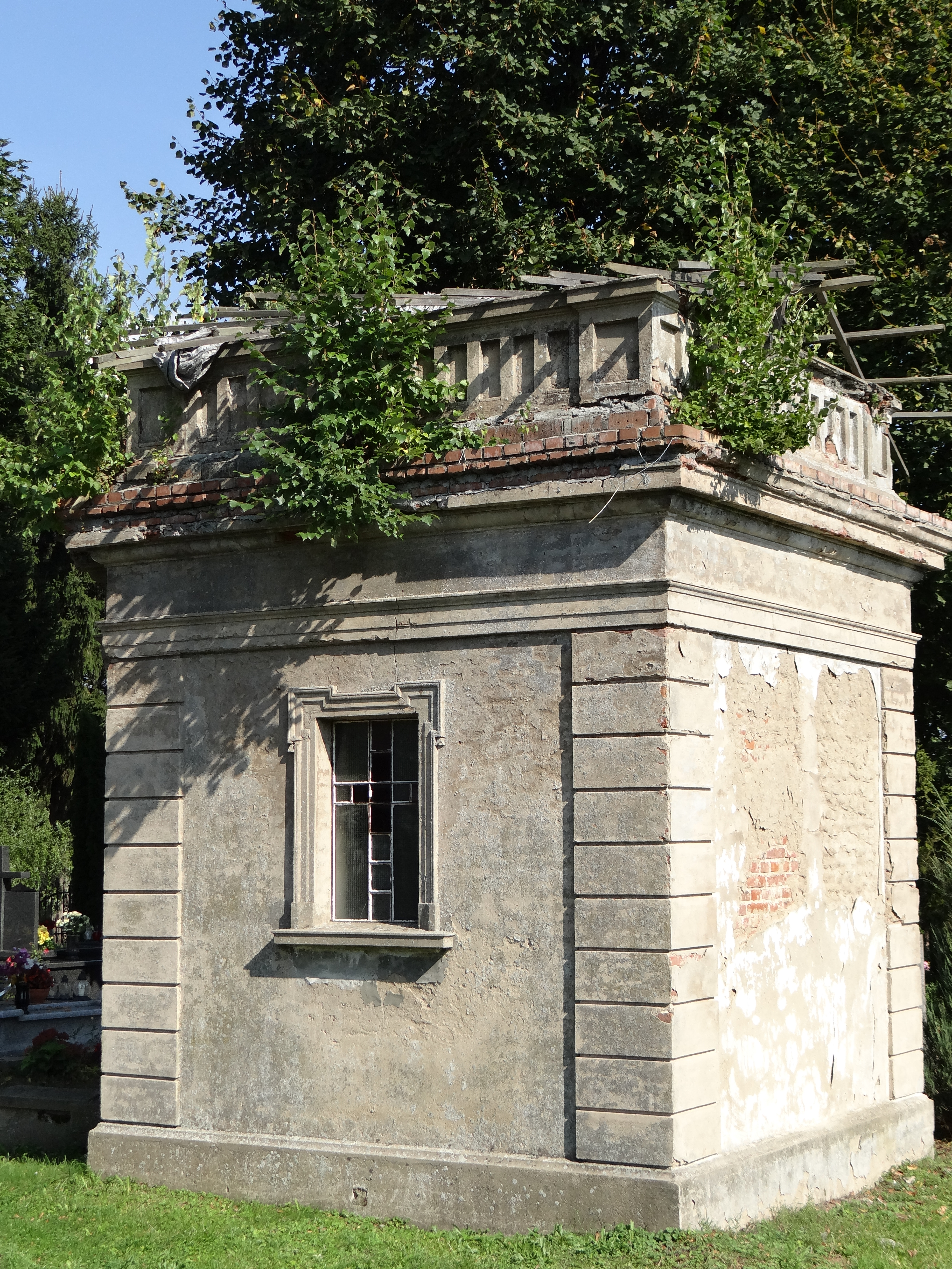 Nowosielce, kaplica grobowa rodziny Dąbrowskich, 1900